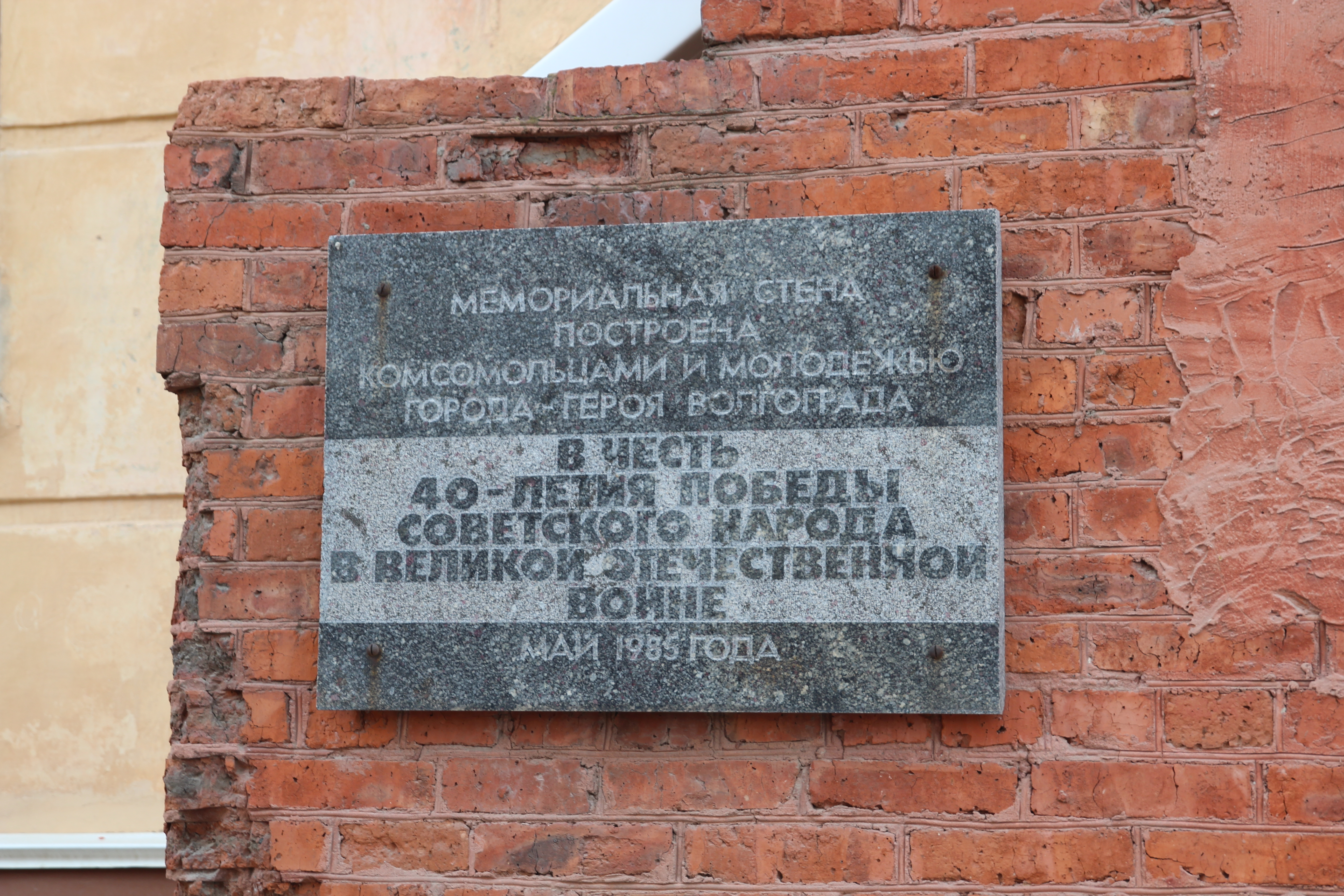 Дом Павлова